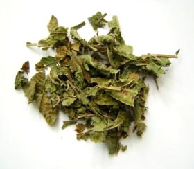 Mitragyna speciosa Kratom, DEA Microgram Bullettin, March 2006